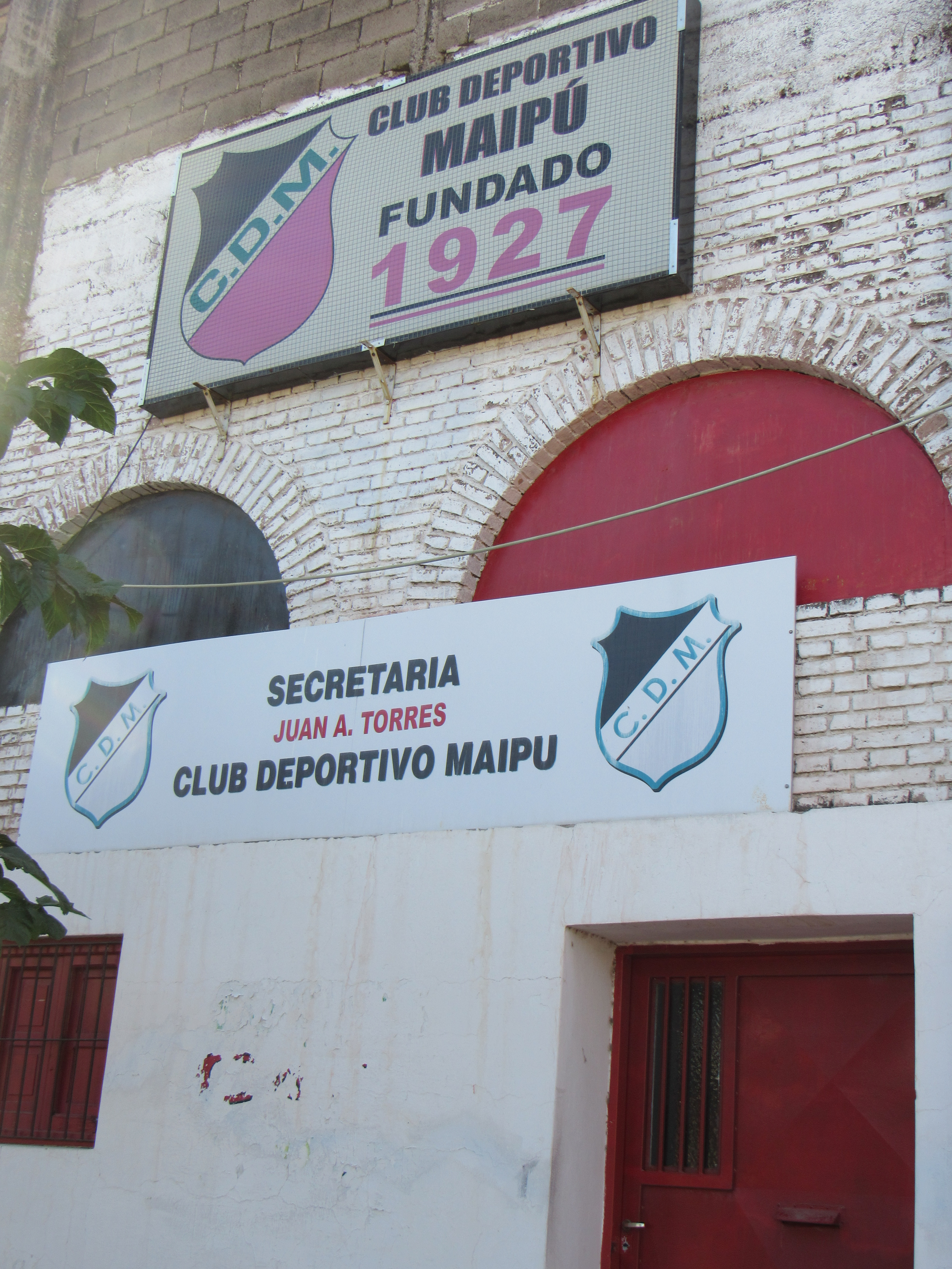 Instalaciones del Club Deportivo Maipu en Maipú, Mendoza, Argentina.